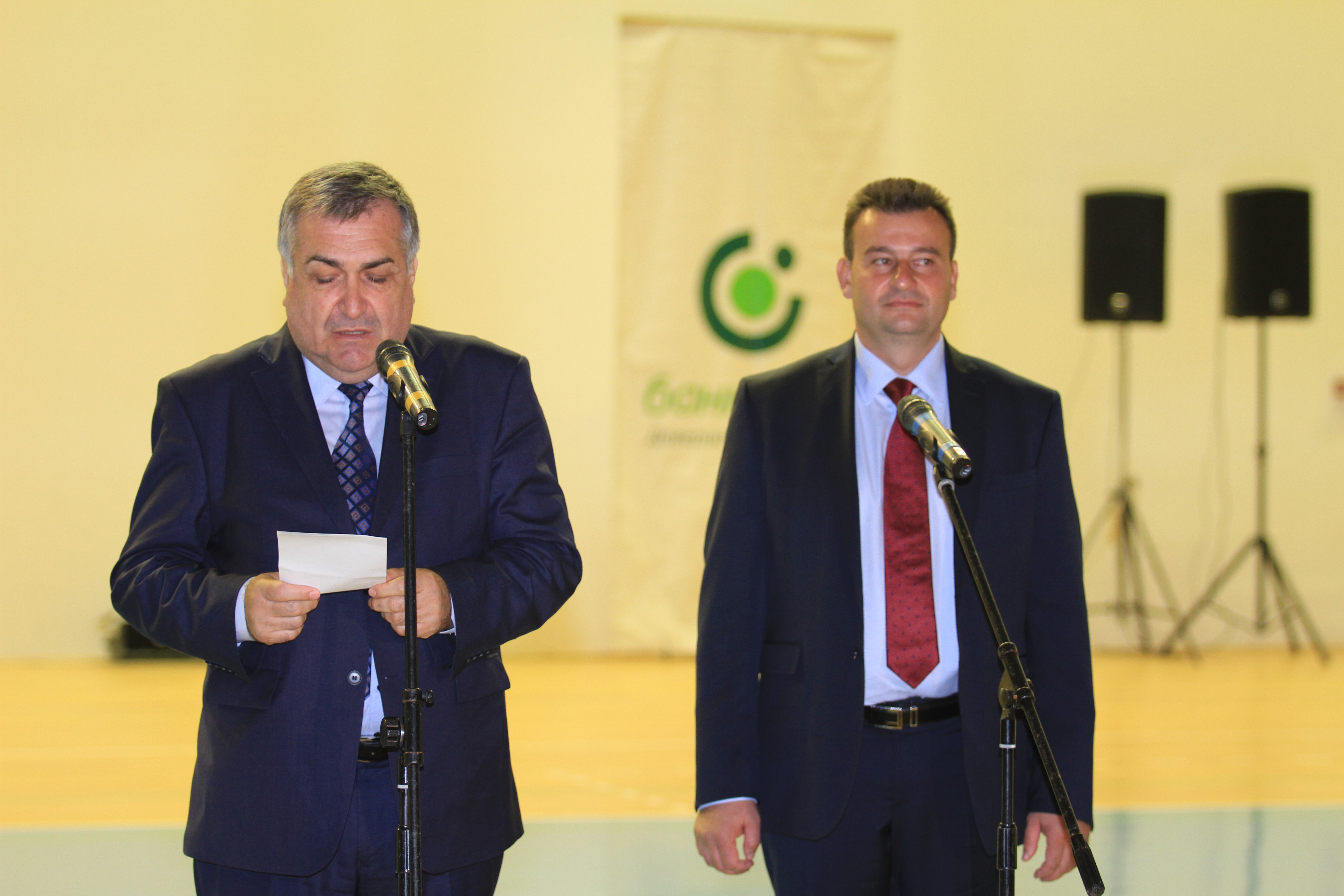 Премиерът на България Георги Близнашки и кматя на Община Сливница Васко Стоилков по време на тържествата за "50 години Сливница град"